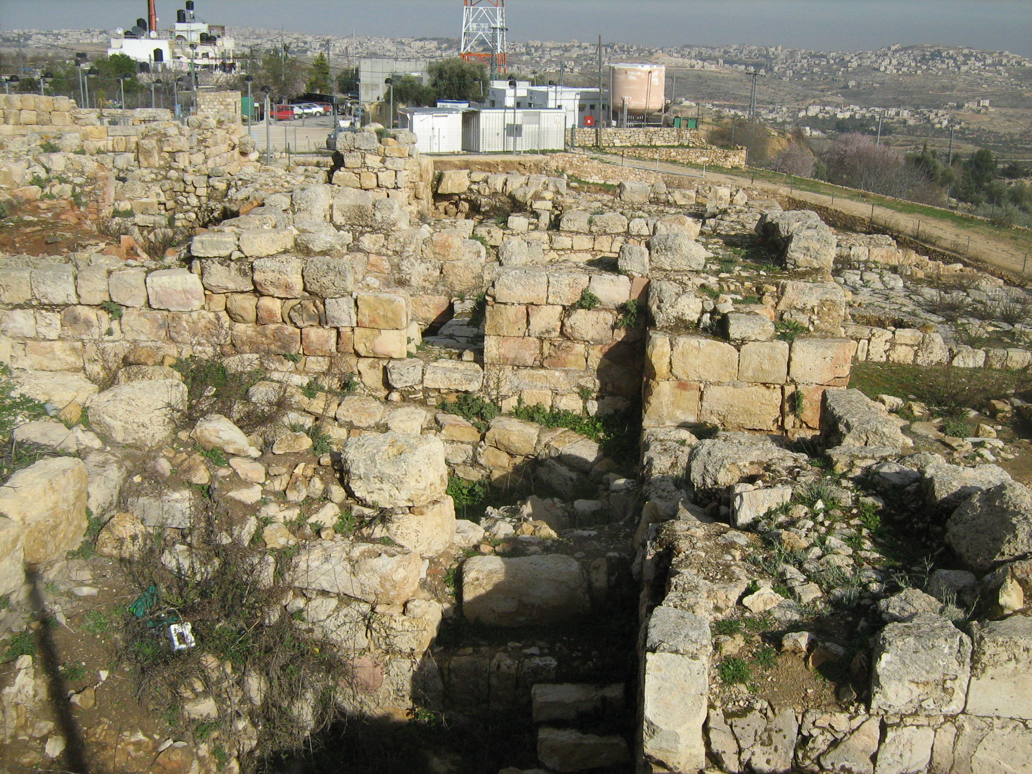 נבי סמואל